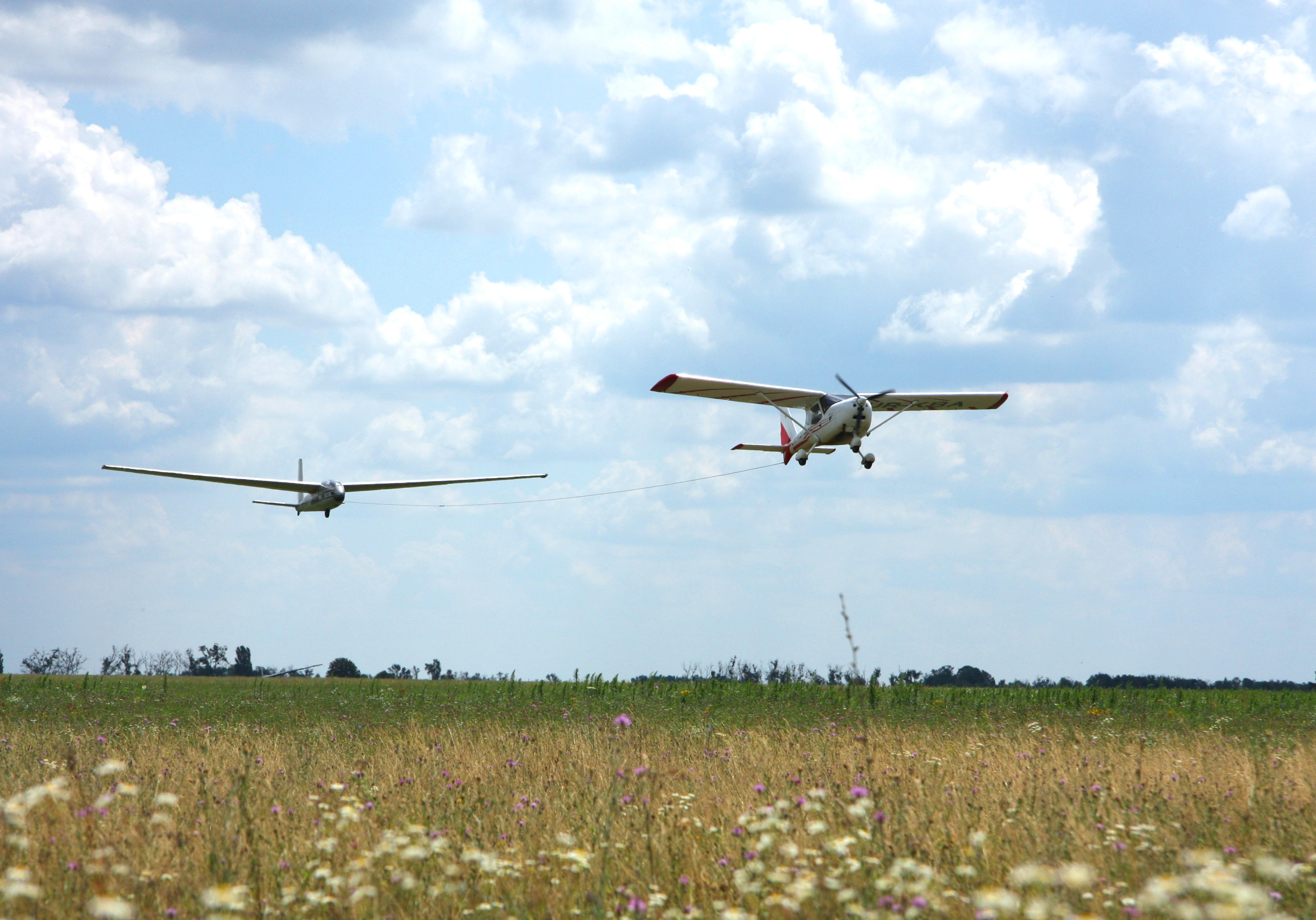 L-13_towed_by_K-10